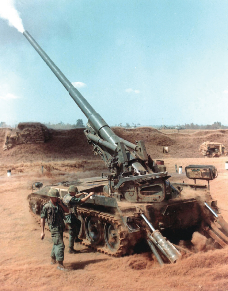 Firing M-107, 175mm gun during Operation San Angelo, Vietnam War, 1968